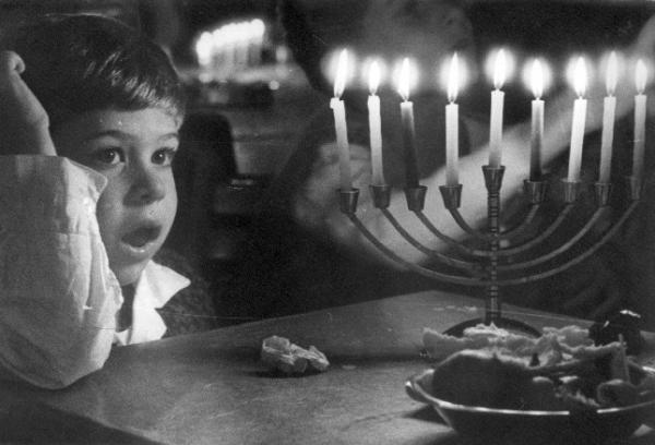 Un enfant devant une hanoukkia brillant de tous ses feux à Zot Hanoucca (8ème jour).